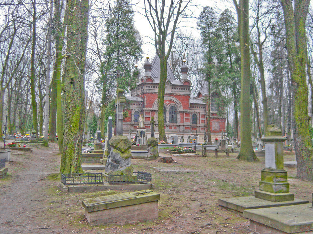 Cmentarz przy ulicy Lipowej w Lublinie - część prawosławna. Widok na cerkiew pw. Świętych Niewiast Niosących Wonności.